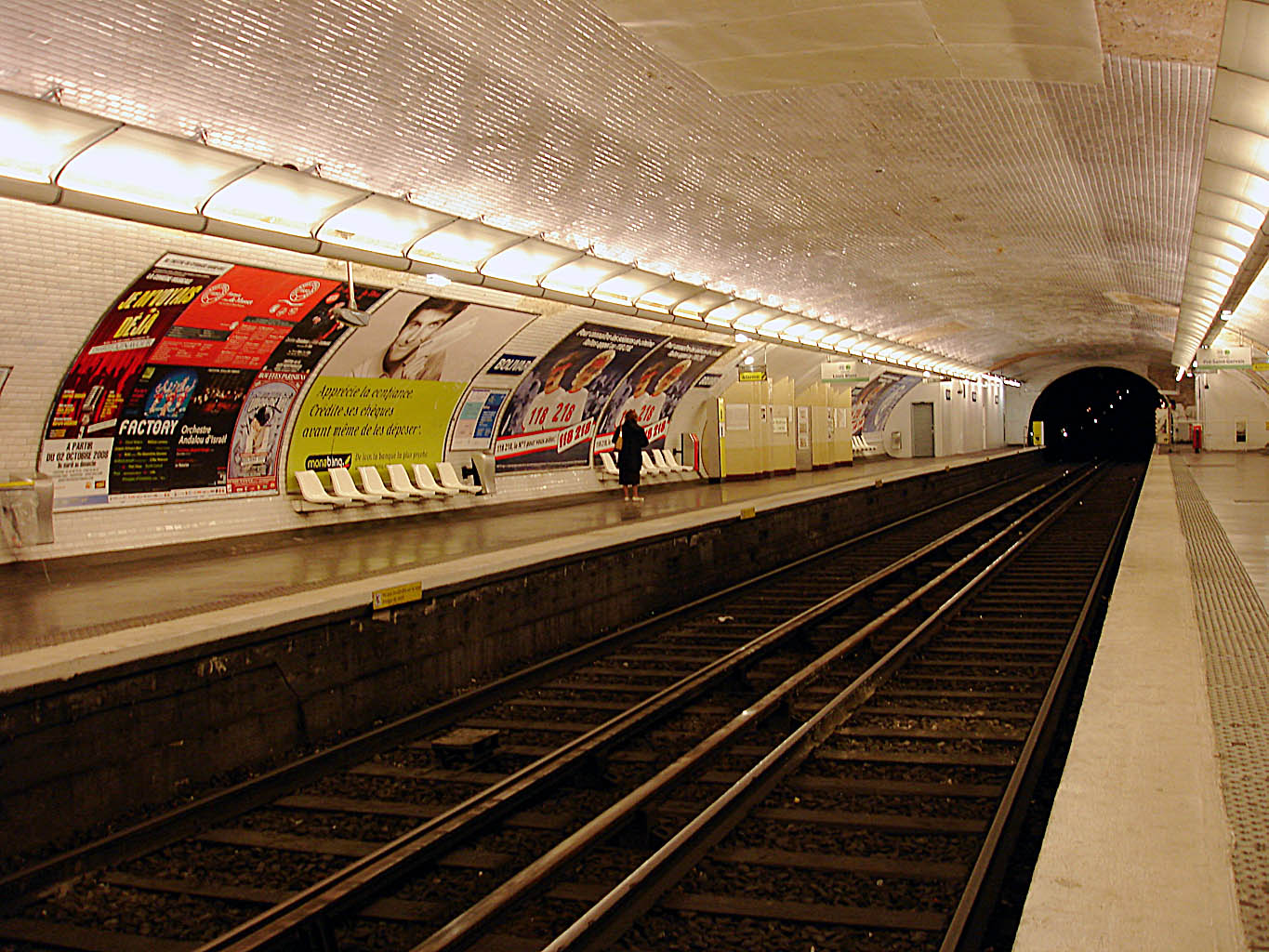 Station Bolivar, de la ligne 7bis du métro de Paris, France.